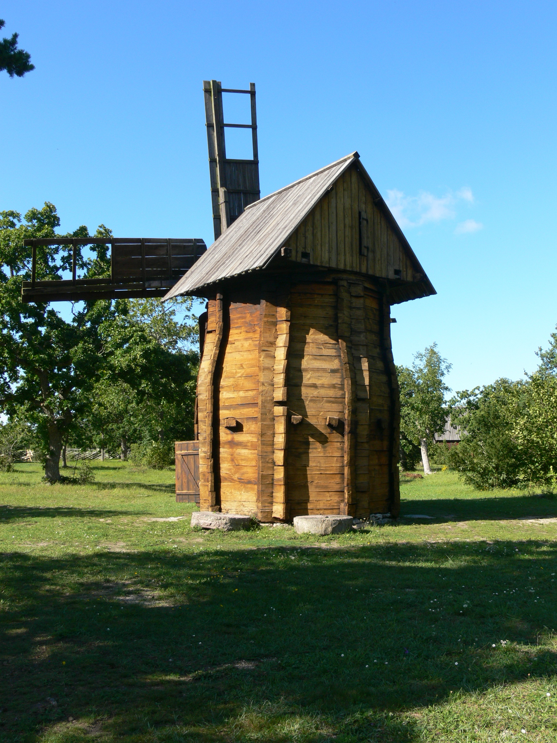 Bunge Museum auf Gotland. Windmühle als Getreidemühle: Außenansicht von hinten